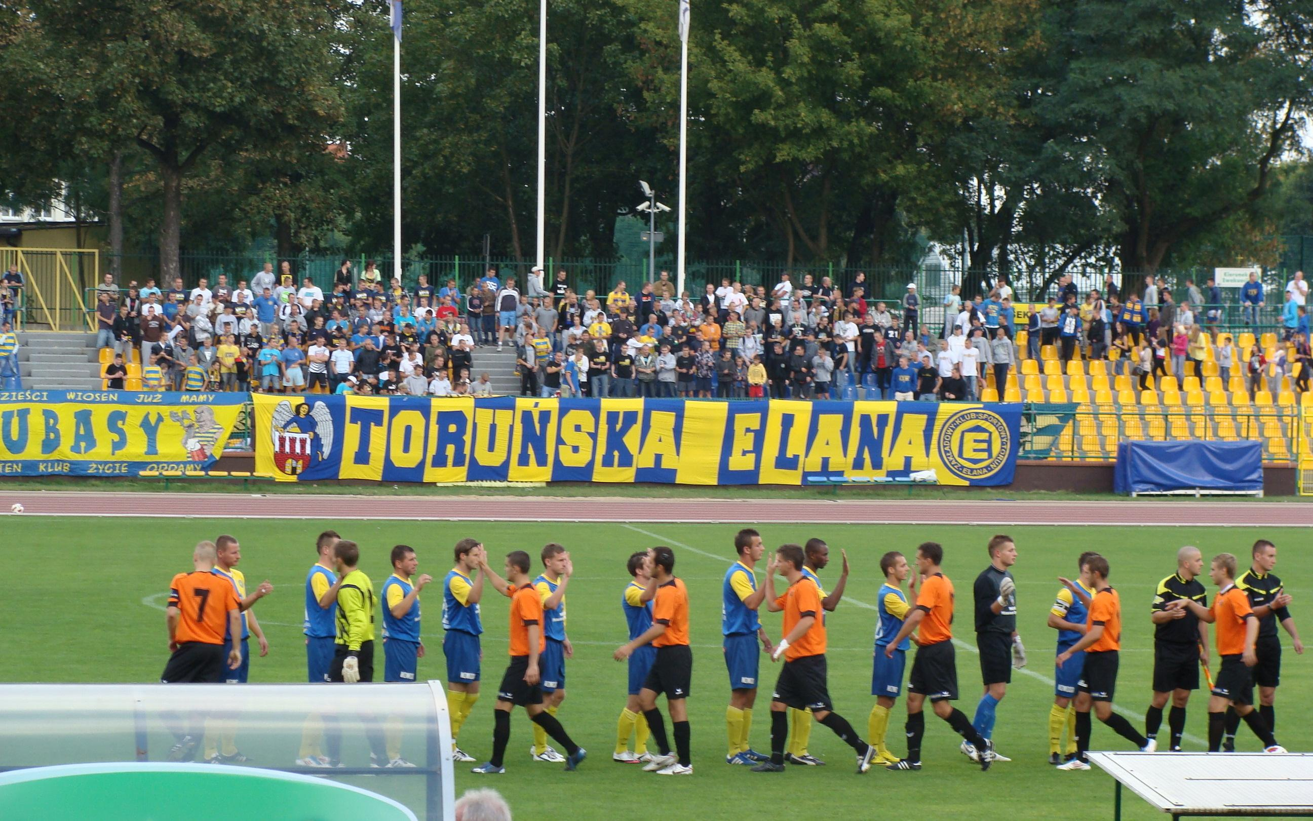 Mecz II ligi (grupy zachodniej) Elana Toruń - Chrobry Głogów